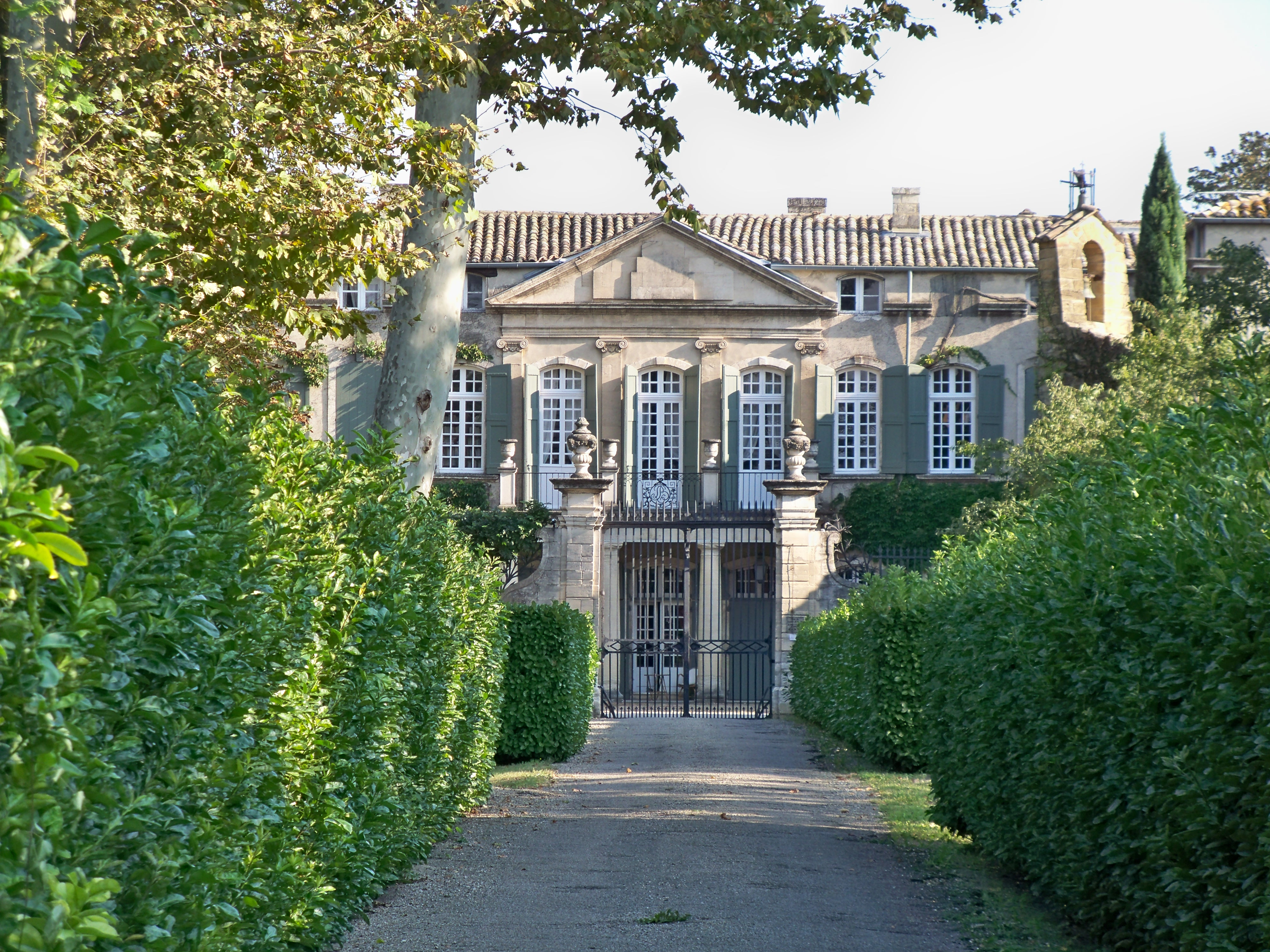 Vue sur le chateau de Brantes à Sorgues (84) .